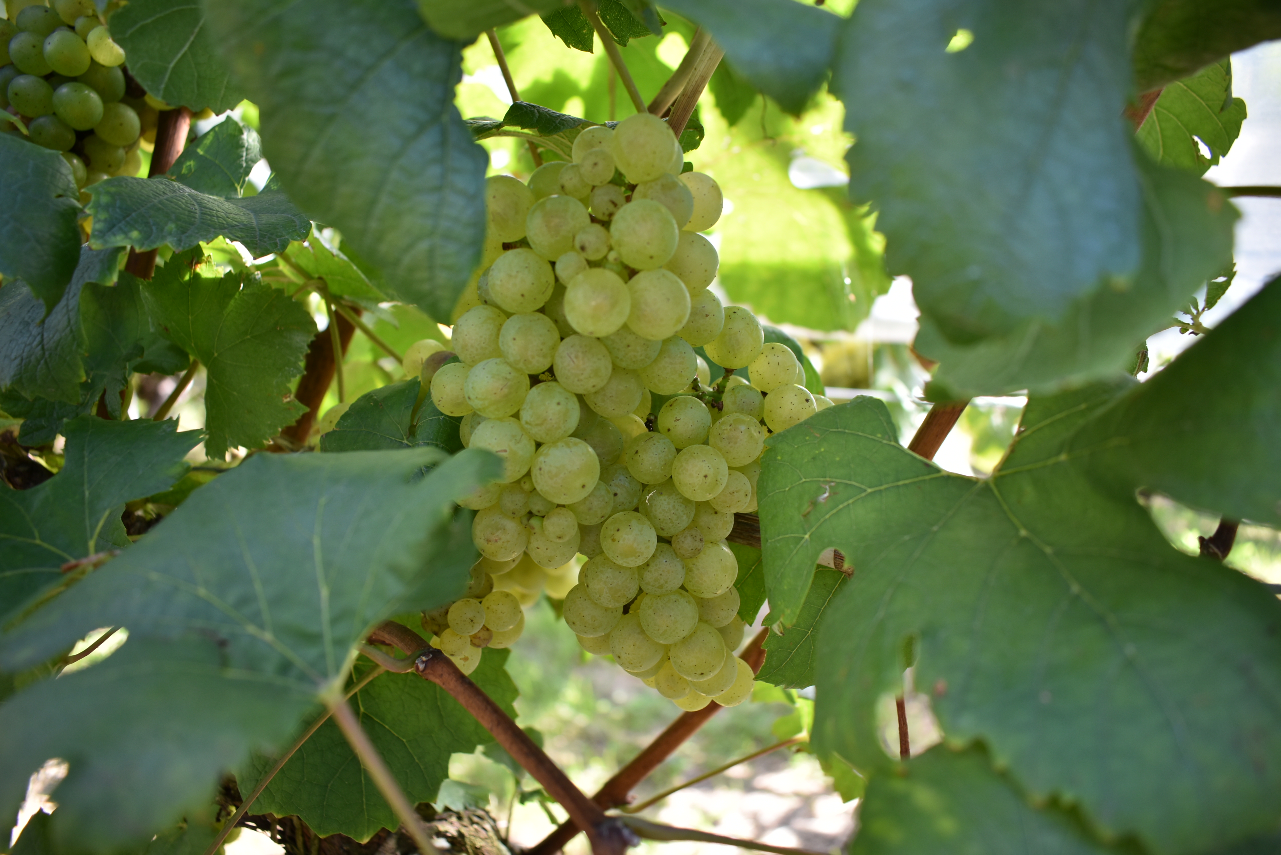 丸藤葡萄酒工業